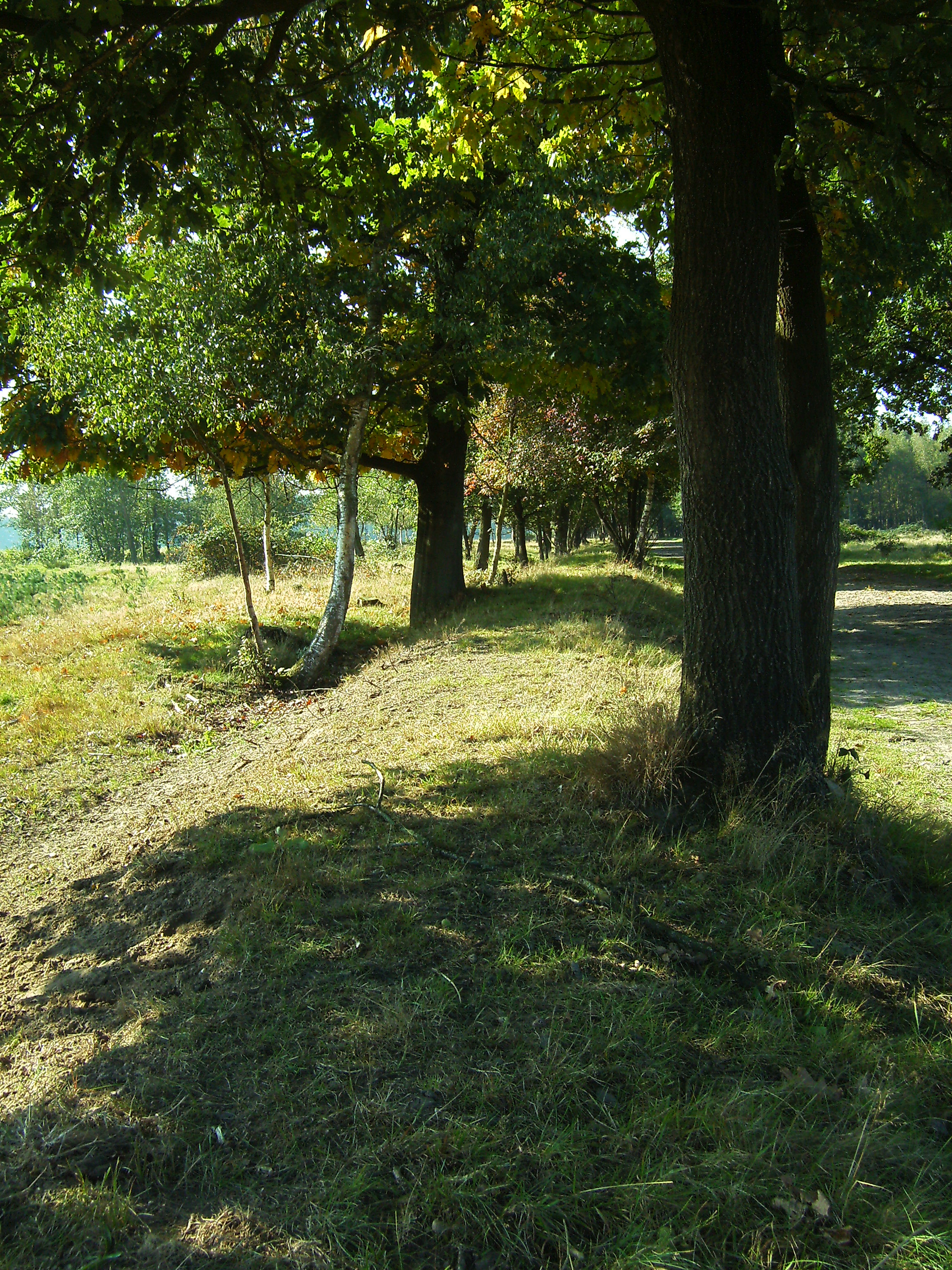 Overblijfselen landweer in de Borkeld ten zuiden van Rijssen